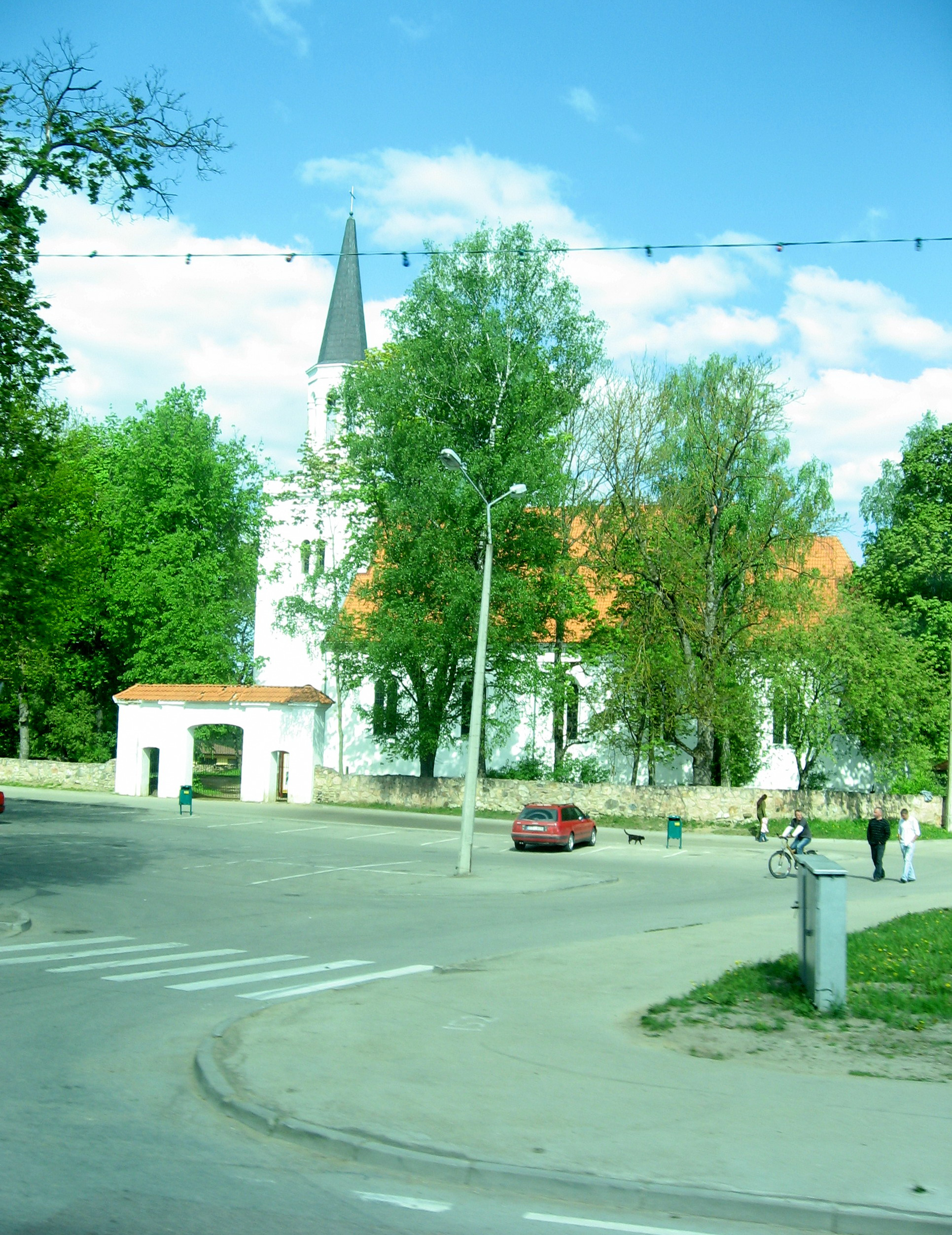 Iecavas luterāņu baznīca